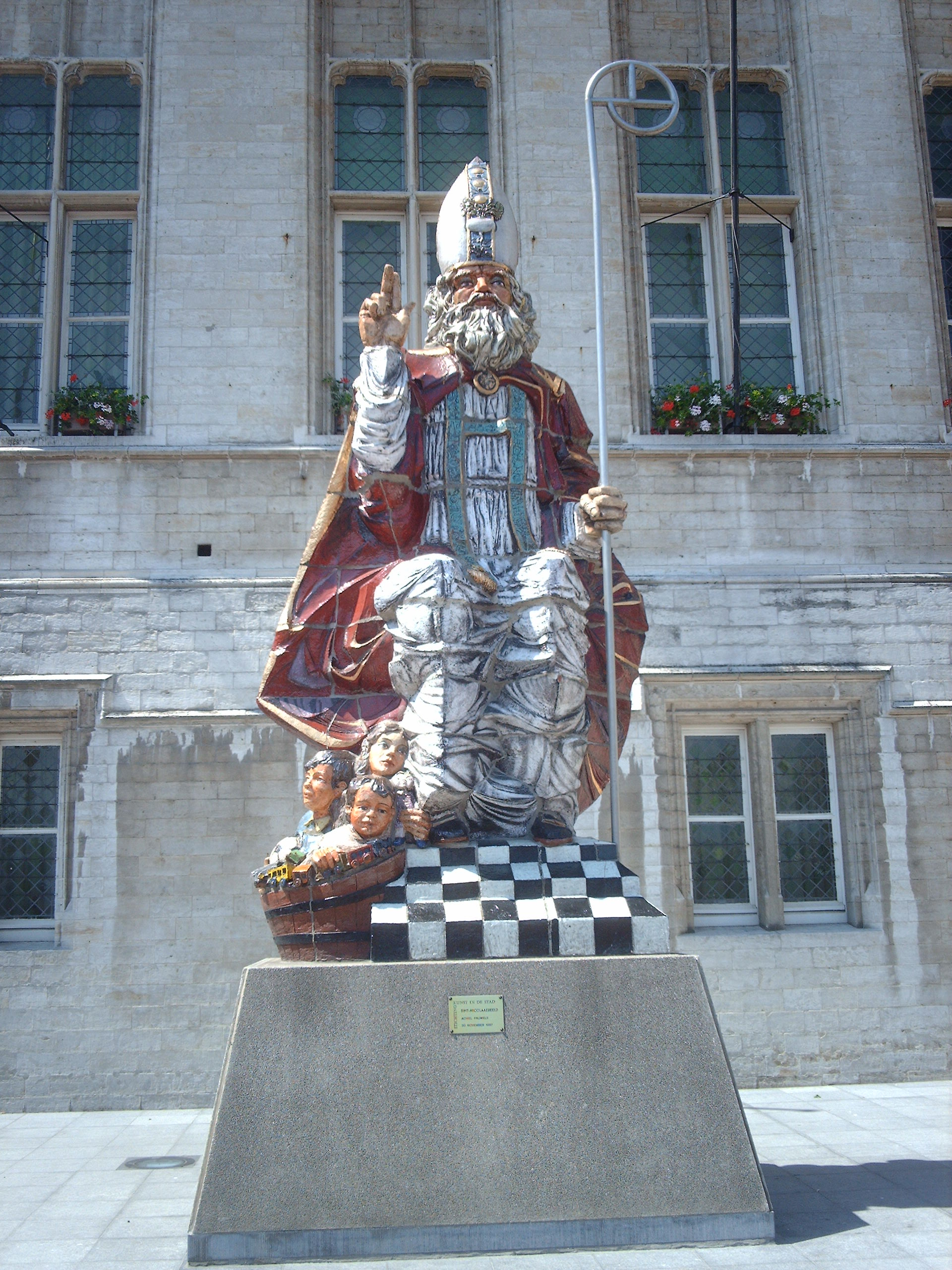 Statue of Santa Claus (Sinterklaas) in Sint-Niklaas